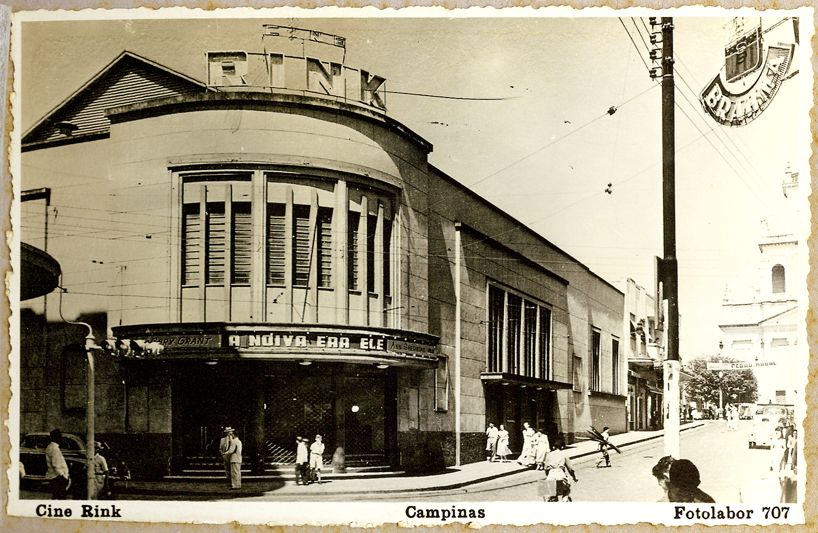 Obra que integra o acervo do Museu Paulista da USP. Coleção Werner Haberkorn